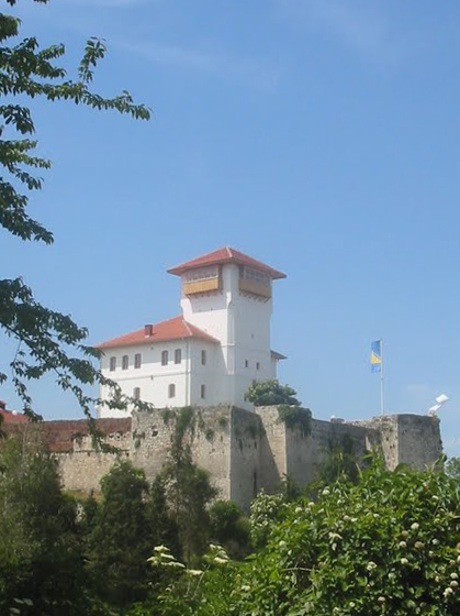 Kula Husein-kapetana Gradaščevića u tvrđavi Gradačac